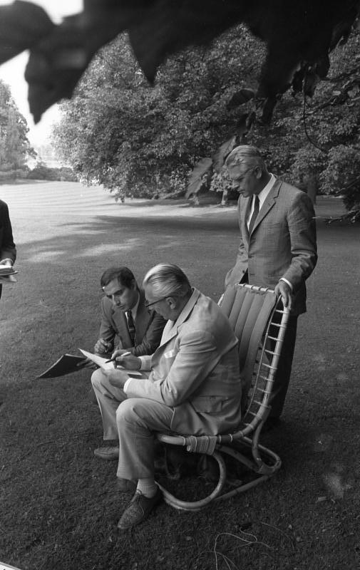 6.9.1969 Office de Radiodiffusion Télévision Francaise (ORTF) Interview mit Bundeskanzler Kurt Georg Kiesinger